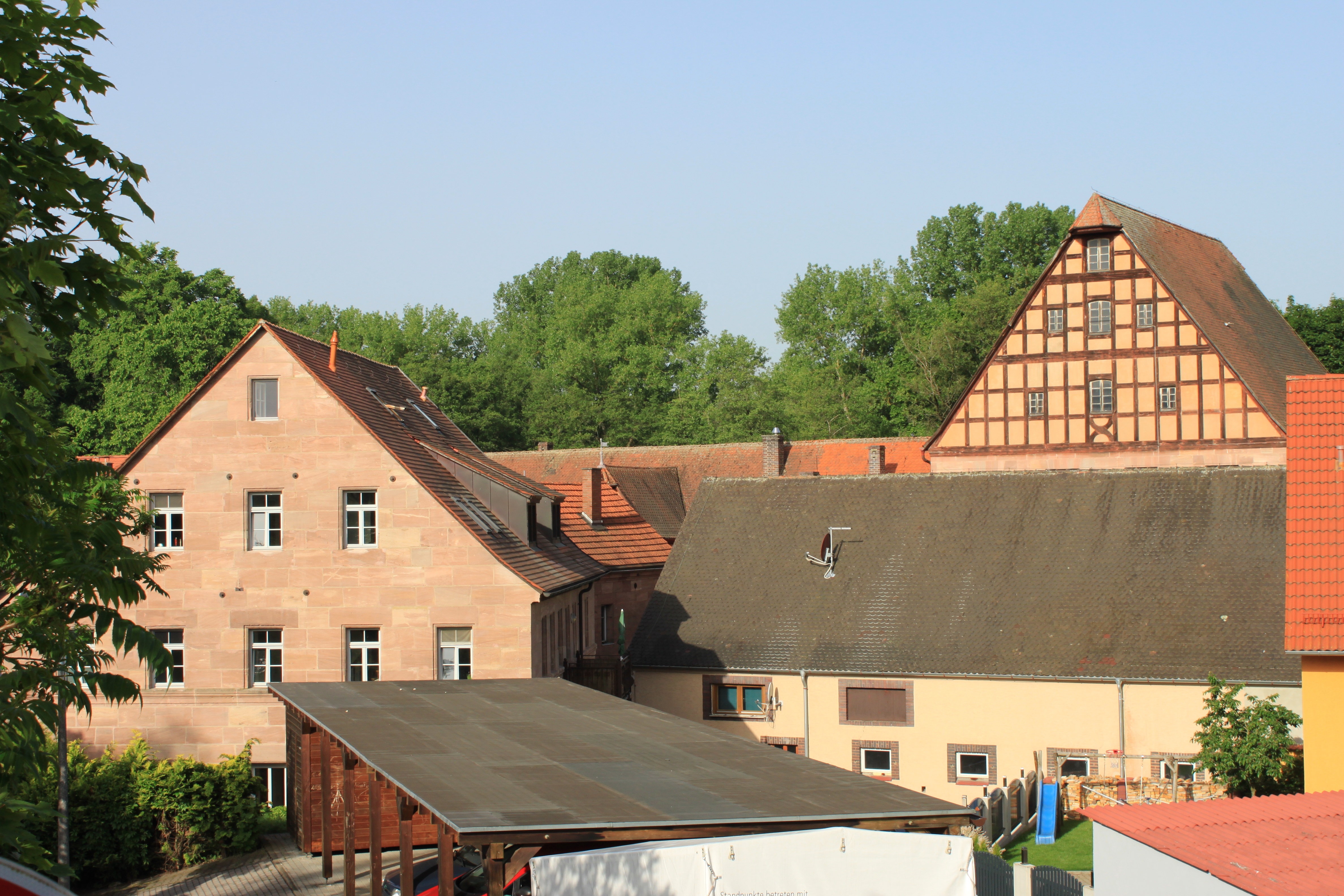 Ehemals Hammerwerk, später Kunstmühle in Katzwang an der Rendite.